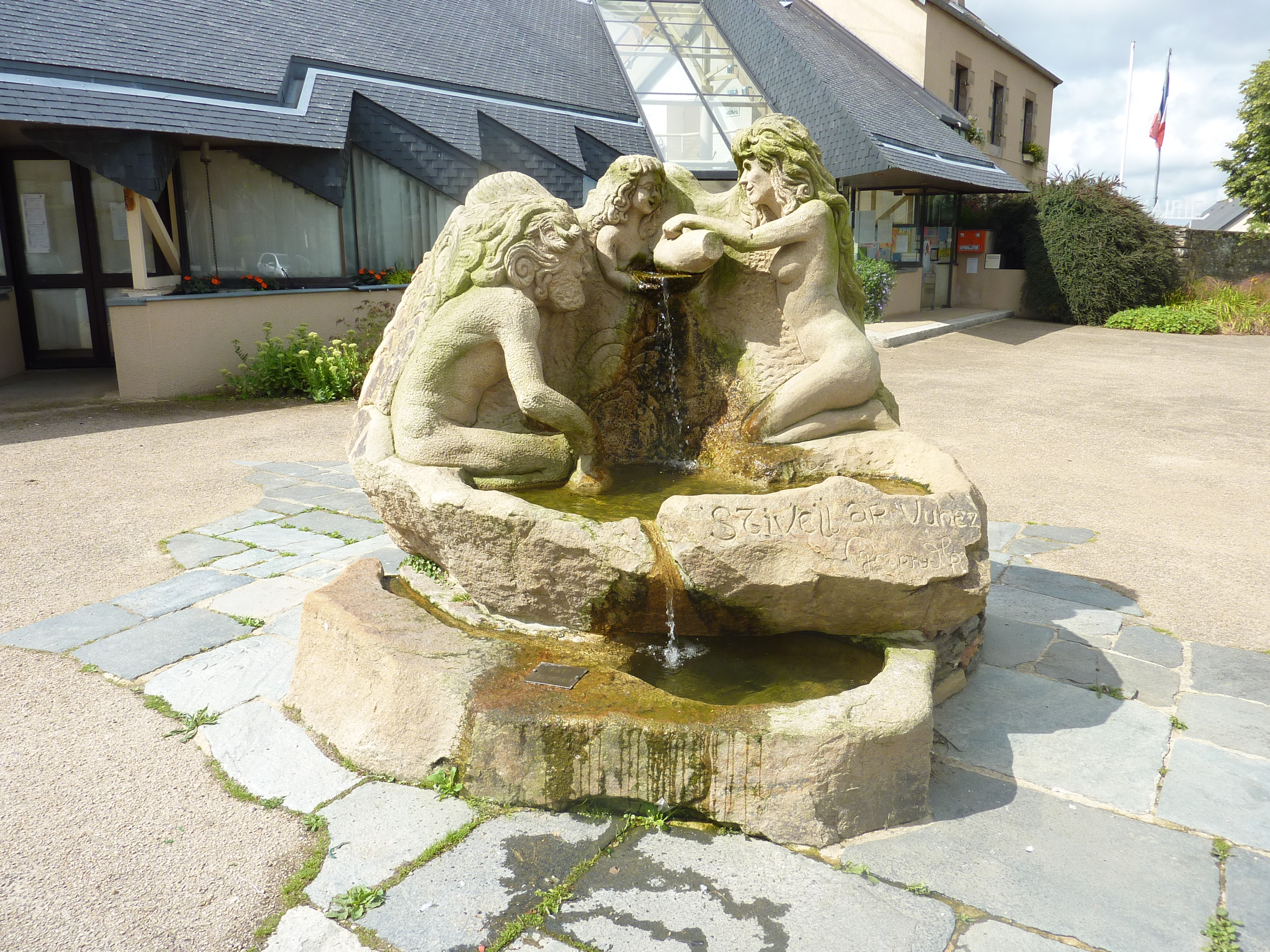 Taulé : la fontaine Stivell ar Vuhez sur la place devant la mairie